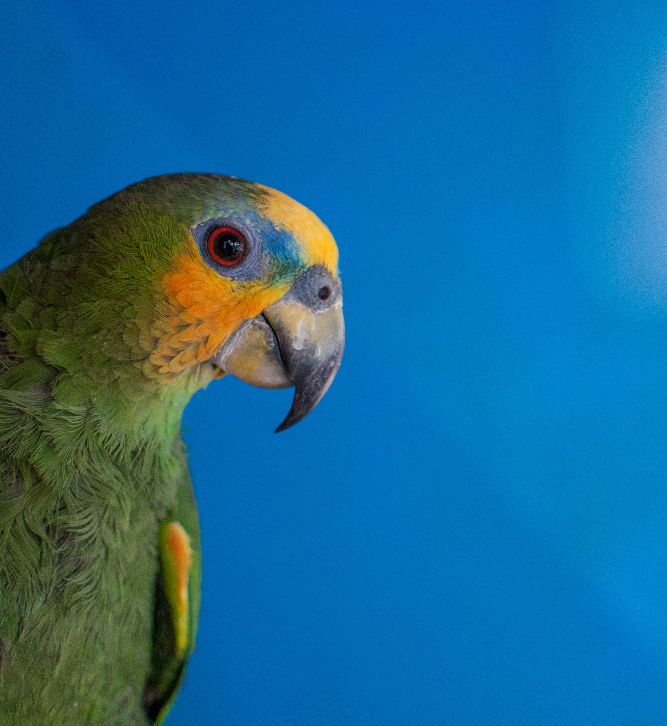 Cotorra Margariteña